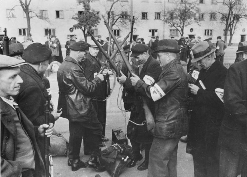 Das deutsche Volk steht auf Waffen werden an die Volkssturmmänner verteilt. Jeder erhält zunächst sein Gewehr. Foto: SS.PK. - Falkowski/Transocean-Europapress PK-H. 6028